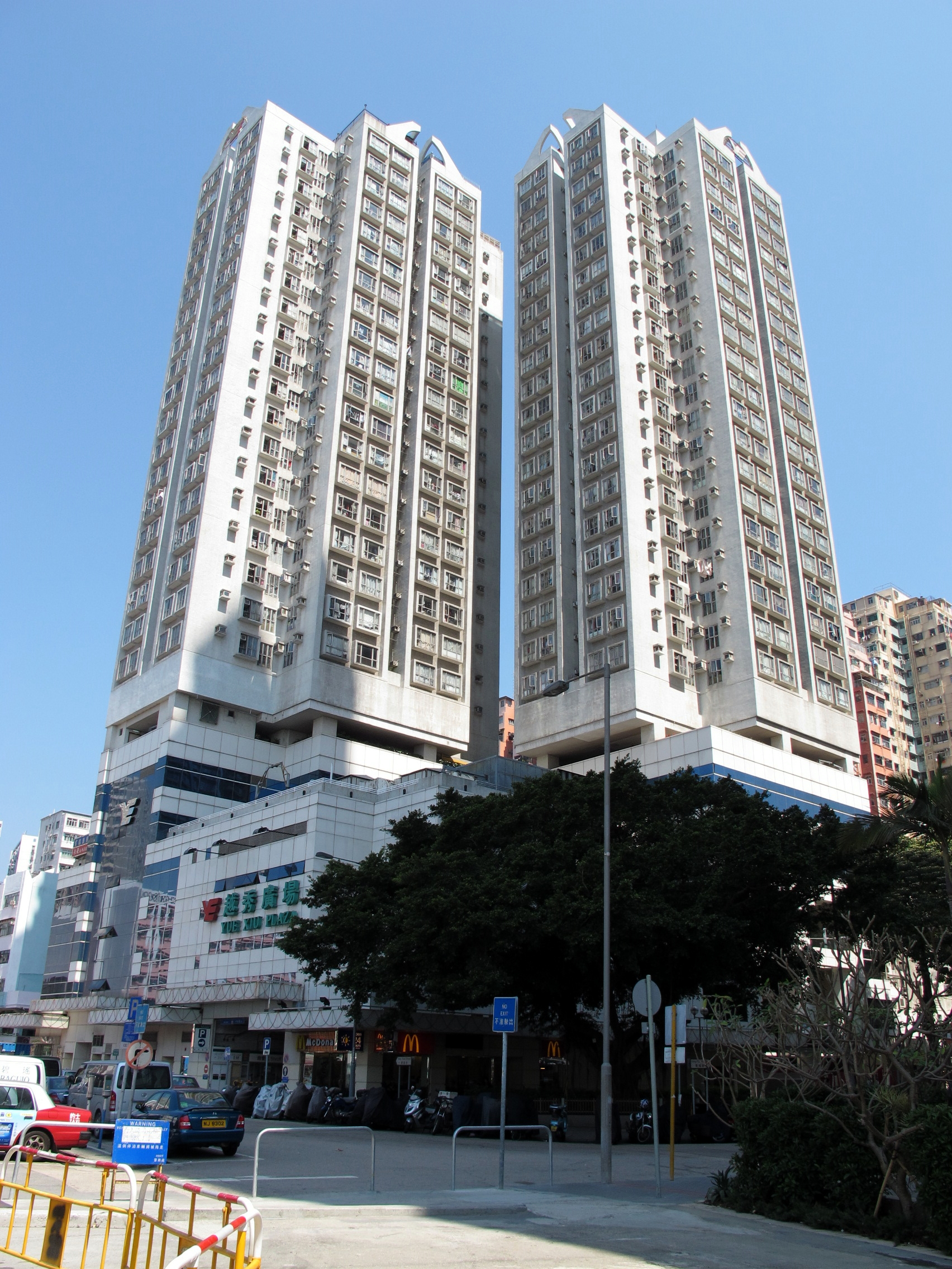 Yue Xiu Plaza